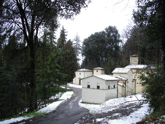 San Vivaldo Cappele con la neve